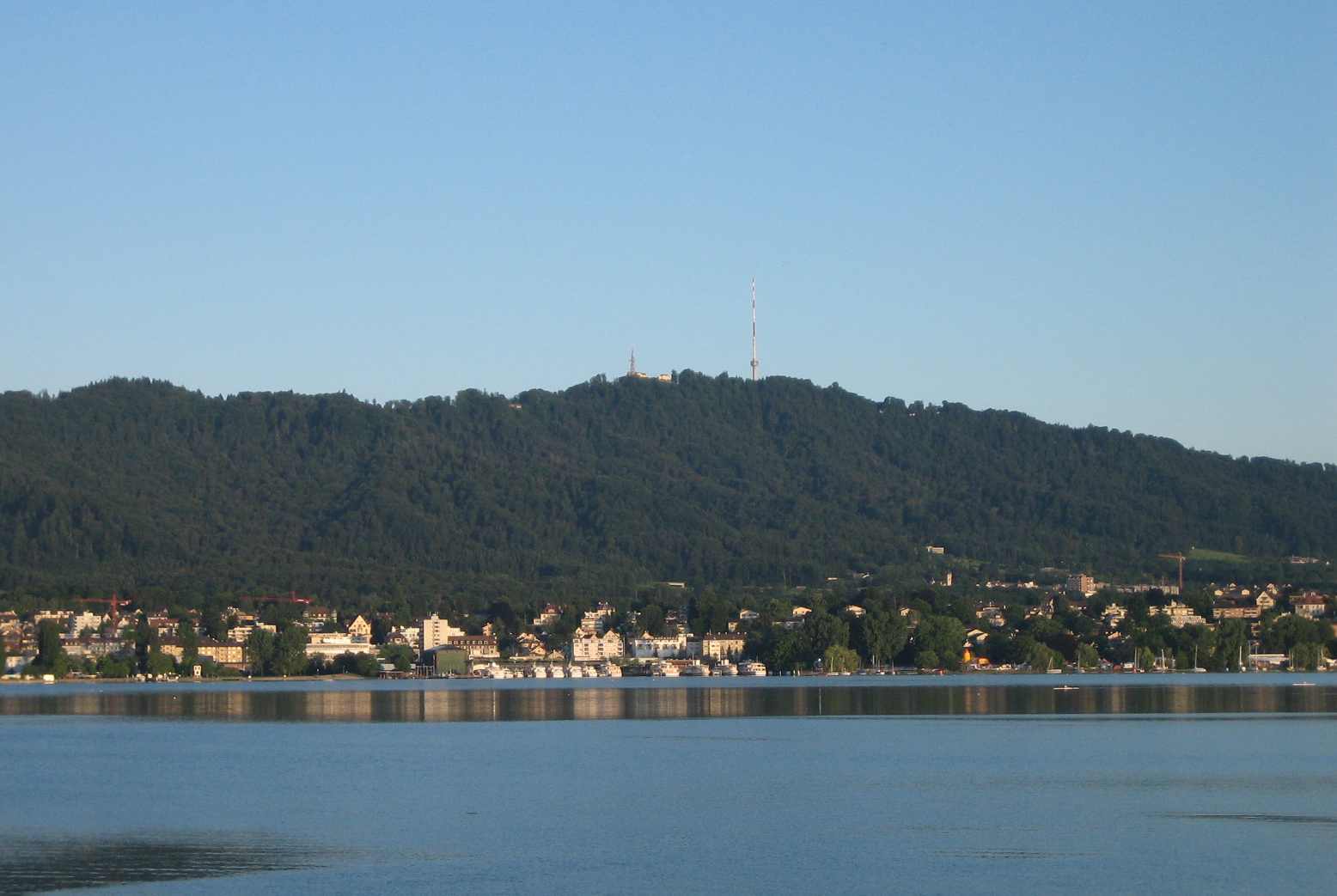 Üetliberg von Zollikon aus gesehen